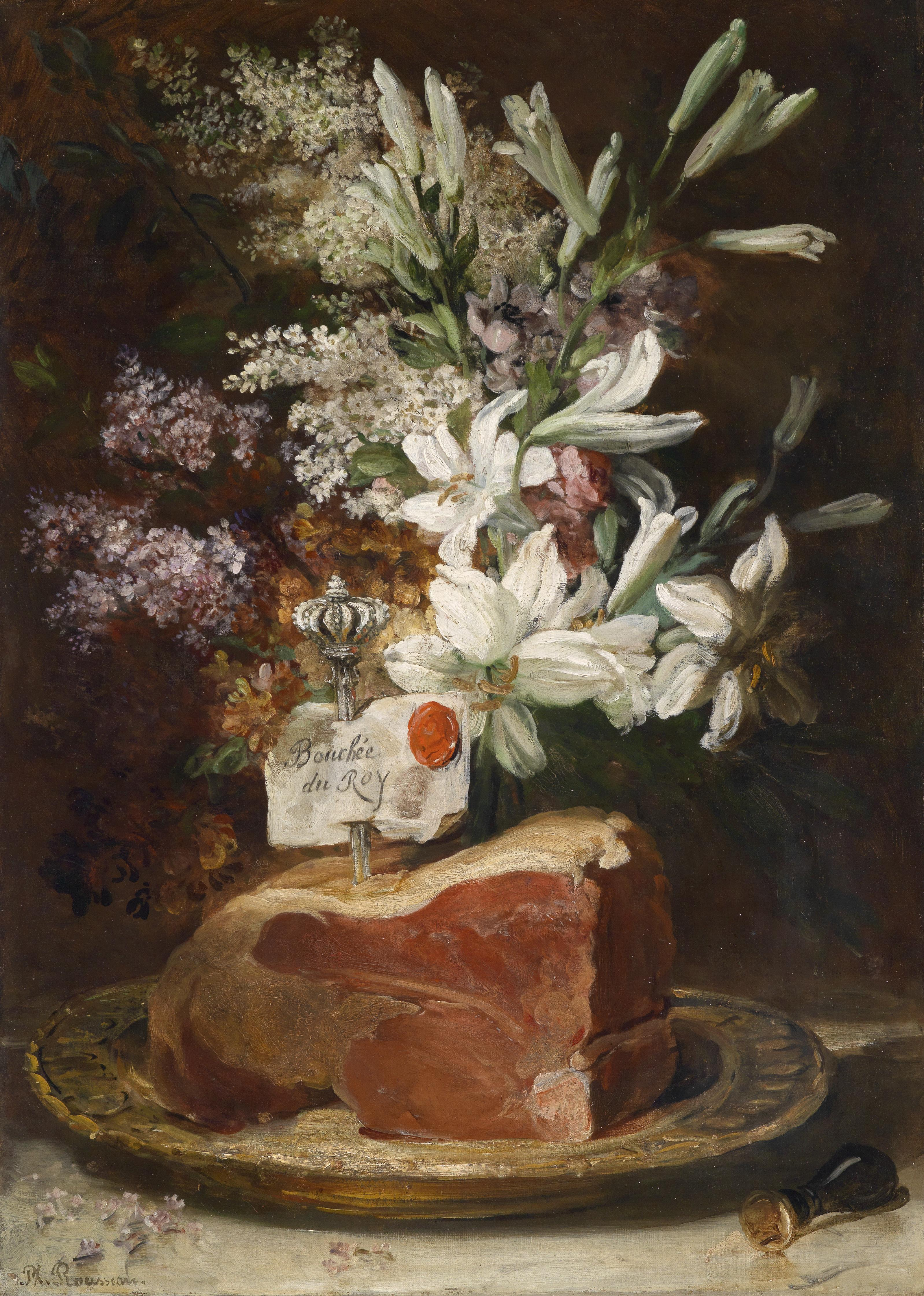 "La Bouchee du Roy", signiert Ph. Rousseau, Öl auf Leinwand,82 x 61 cm